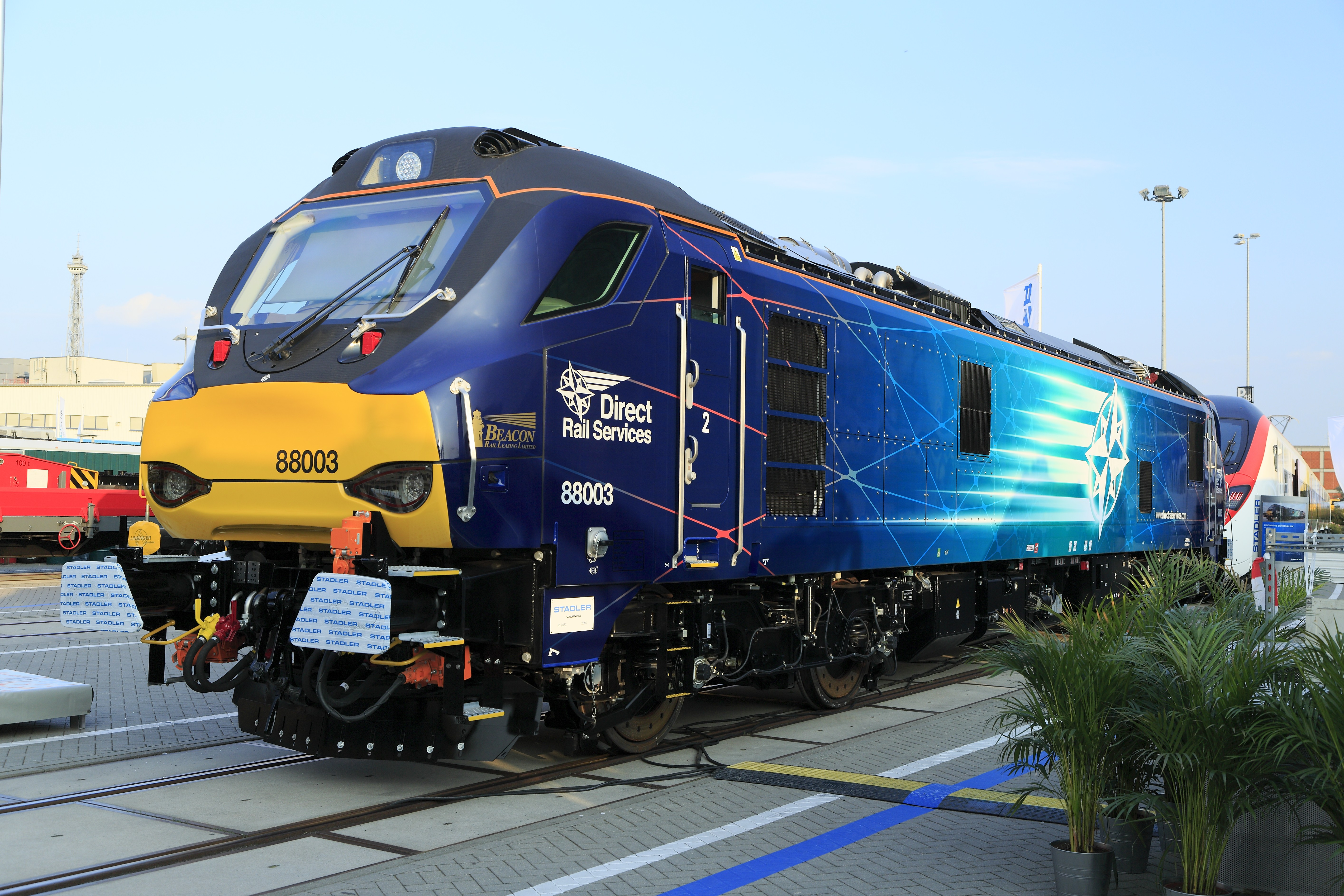 25kV-Ellok für das britische Fahrzeugumgrenzungsprofil mit einem zusätzlichen Dieselgenerator für das Befahren von fahrleitungslosen Gleisen. Die Leistung beträgt unter Fahrleitung 4000, mit Dieselbetrieb 708kW. Die Reihe ist für 160km/h ausgelegt.